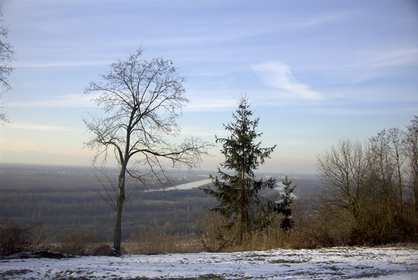 Aussicht von Bamlach auf den Rehin und Frankreich